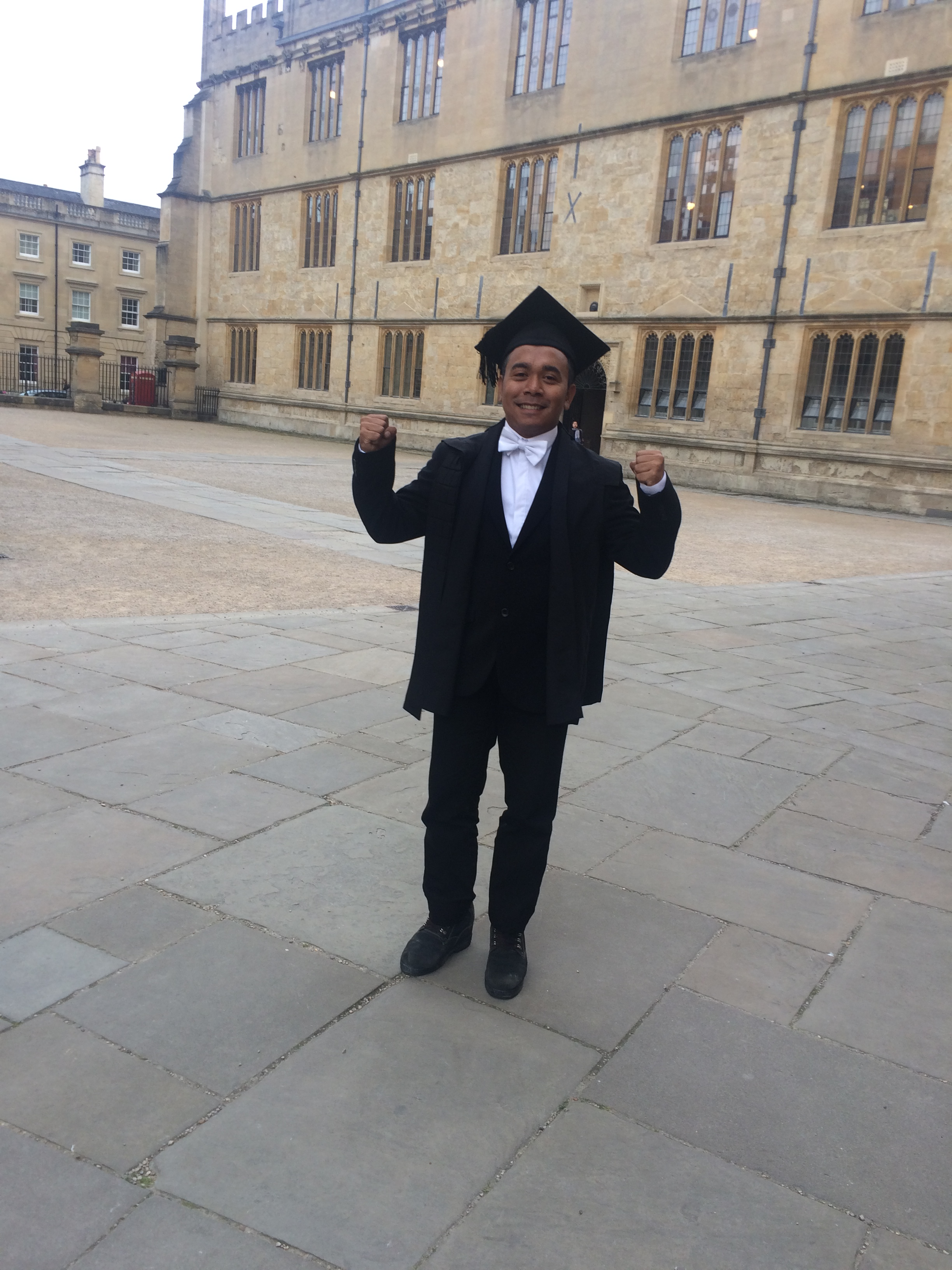 Billy Mambrasar menjalani Upacara Matrikulasi di Universitas Oxford, Inggris, sebagai Salah Satu Mahasiswa Baru